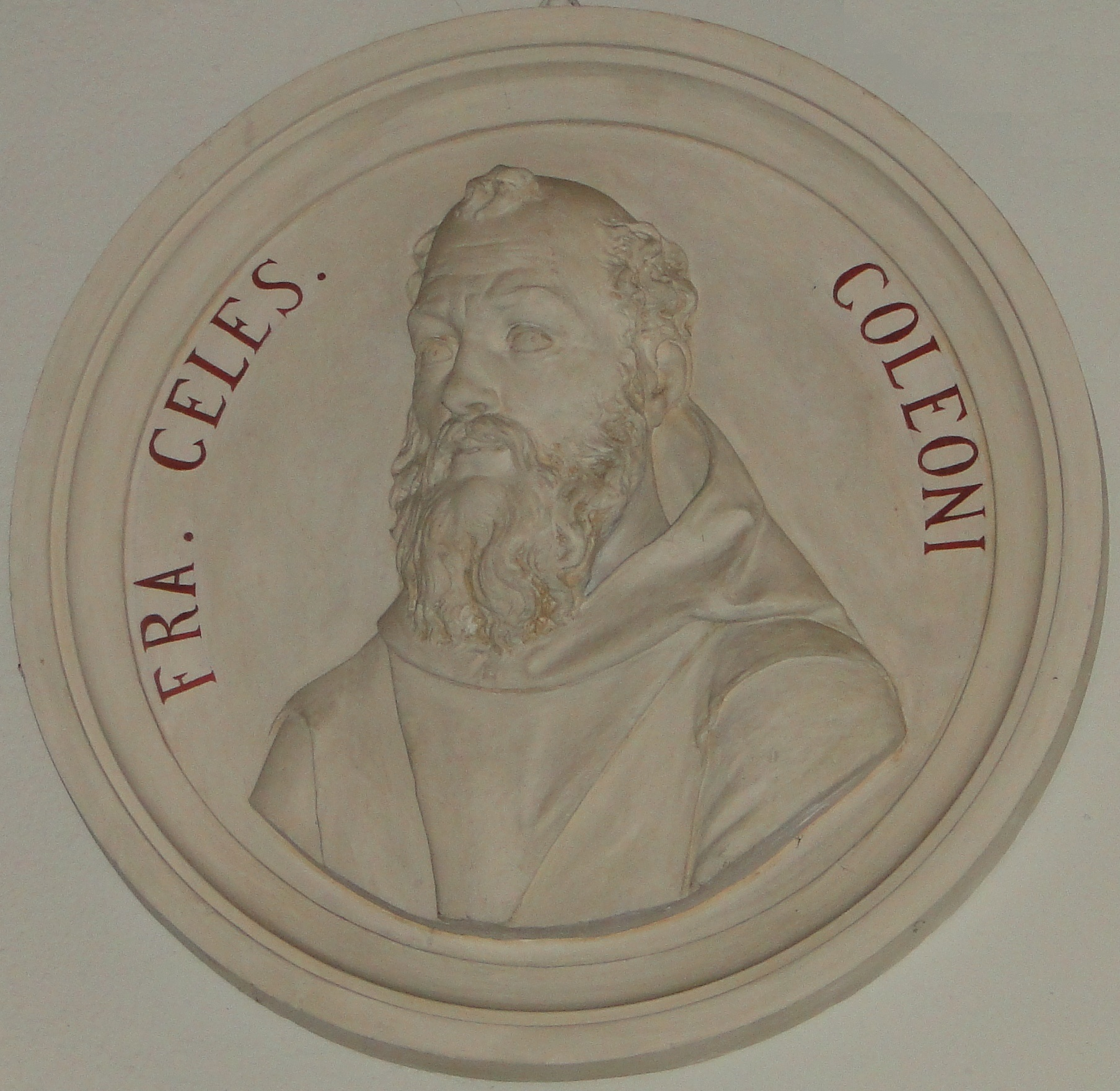 Celestino Colleoni, storico italiano. Medaglia presso Biblioteca Angelo Mai di Bergamo.